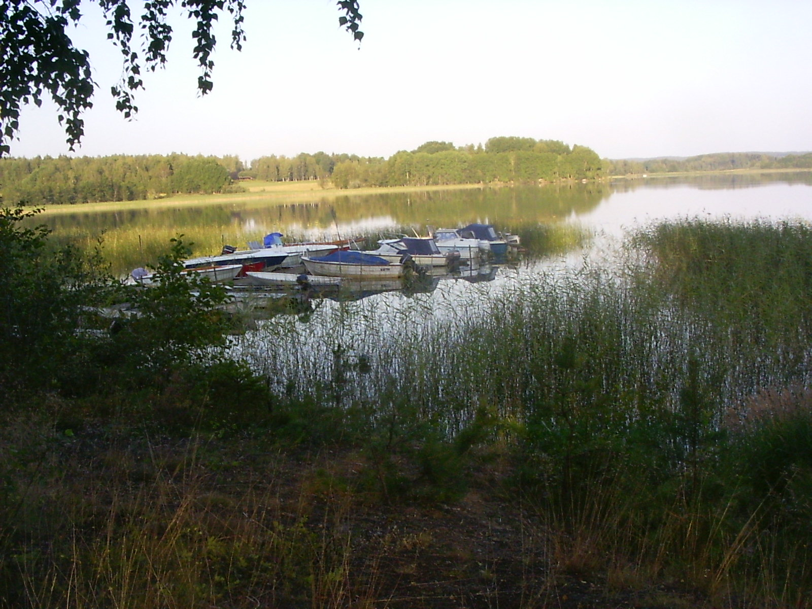 Hörendesjön, strandje Paradijs, zuid van rijksweg 256